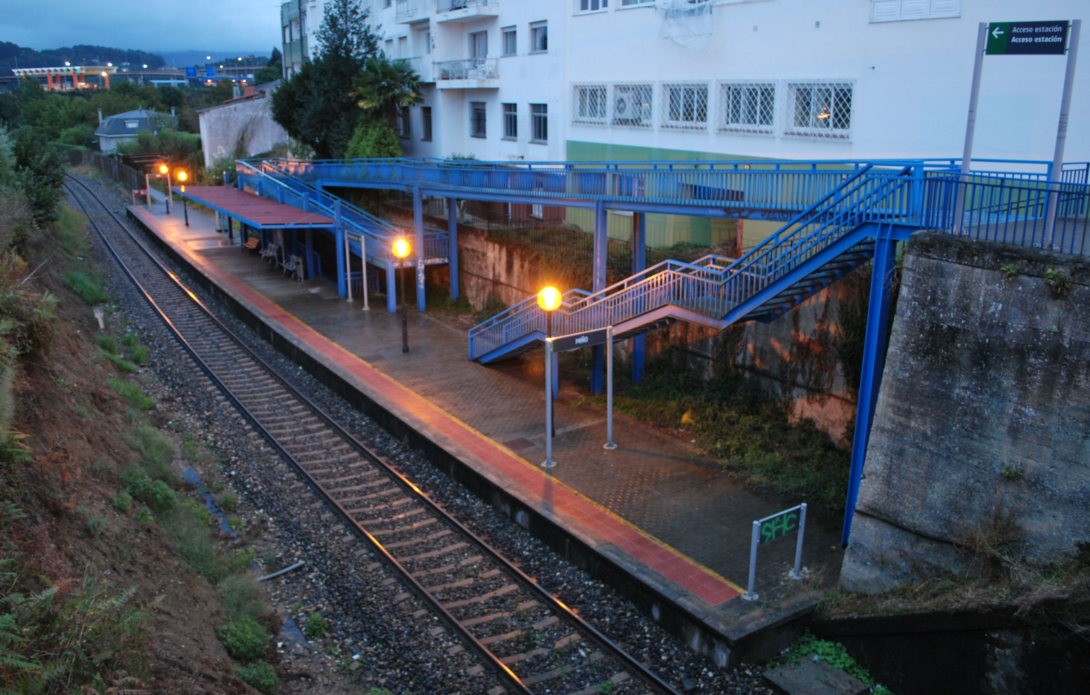 Estación apeadoiro de Miño A Coruña Galiza Spain